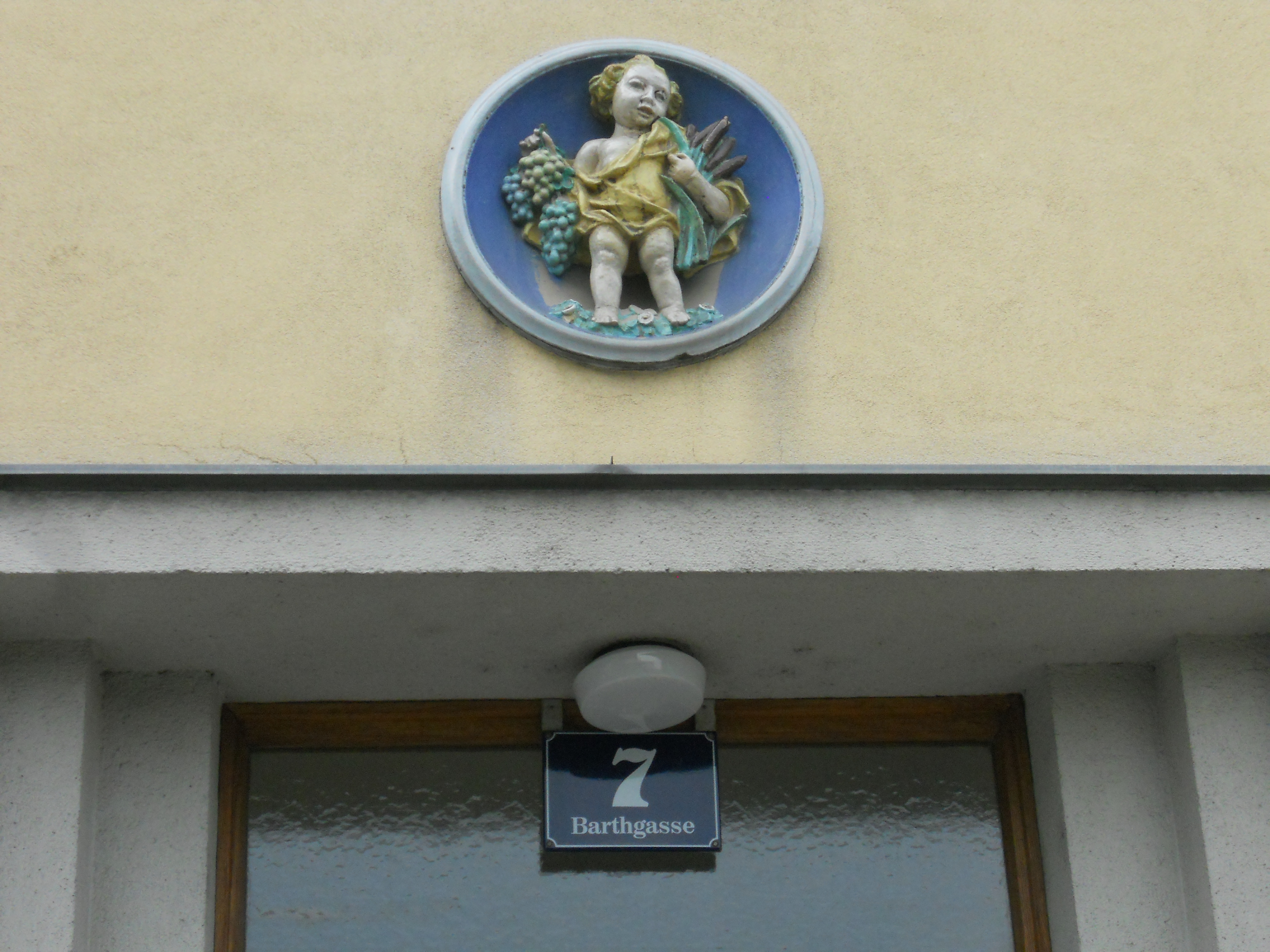 Kommunale Wohnhausanlage Barthgasse 5-7 in Wien, Majolikamedaillon oberhalb einer der drei Eingangstüren: Putto mit Weintrauben und Weizenähren